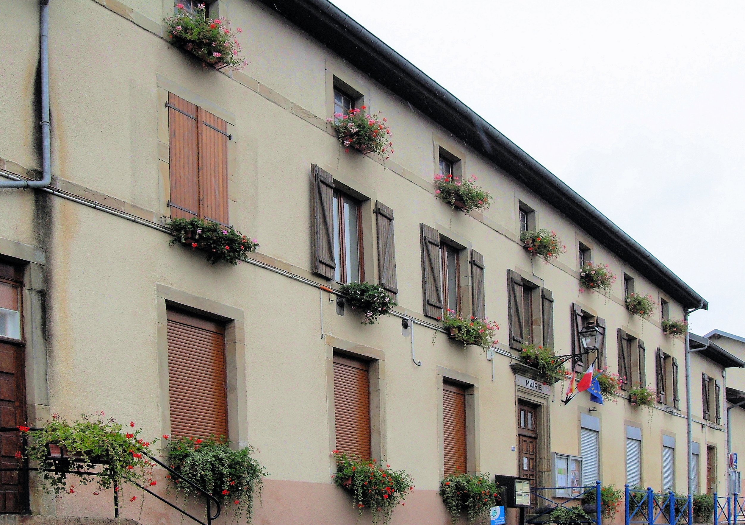 La mairie de Remoncourt